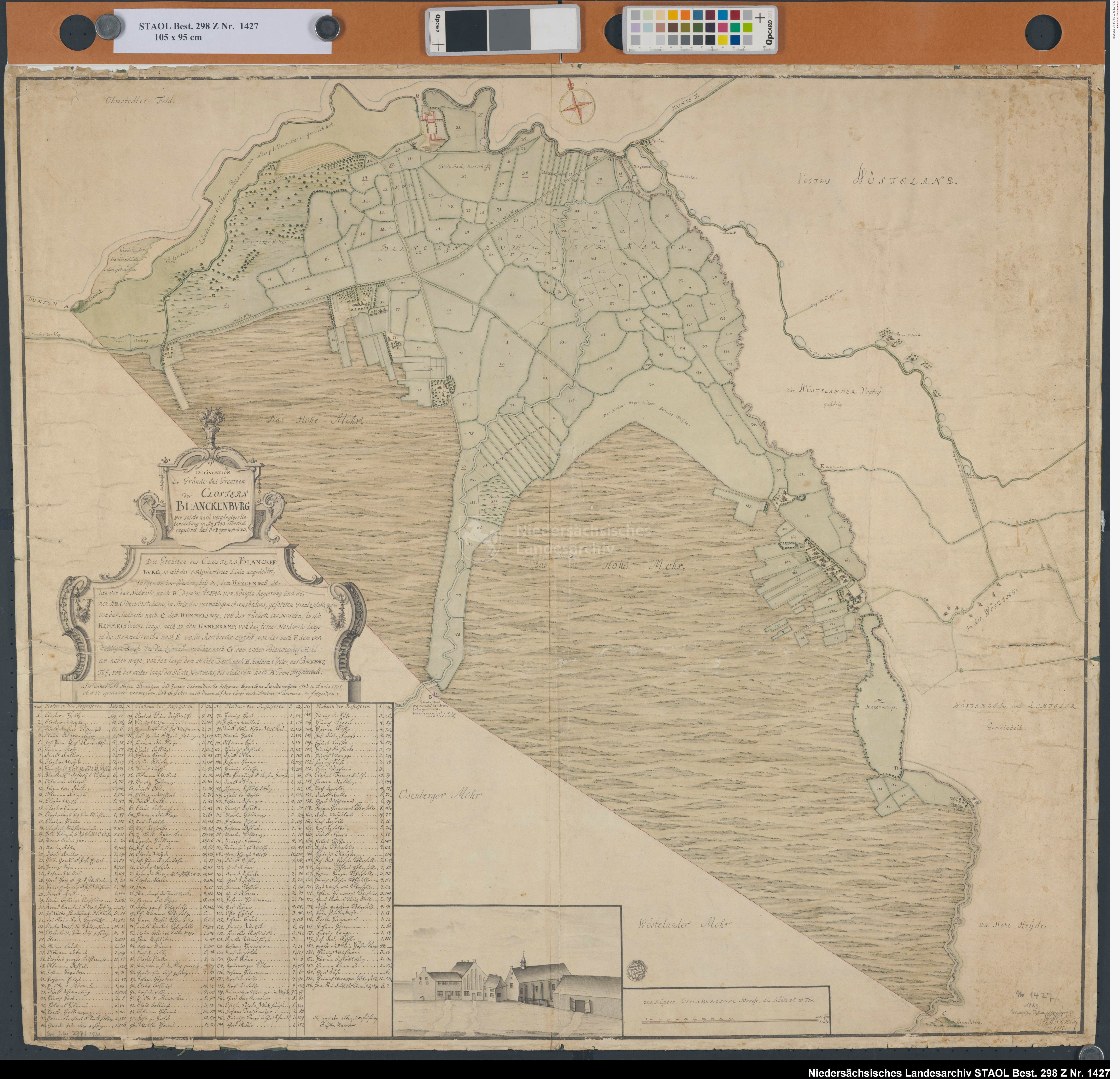 "Delineation der Gründe und Grentzen des Closters Blanckenburg", Zeichnung von 1743